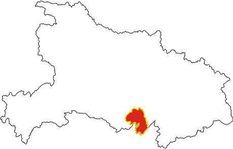 地图中用红色标出了监利县在湖北省的位置